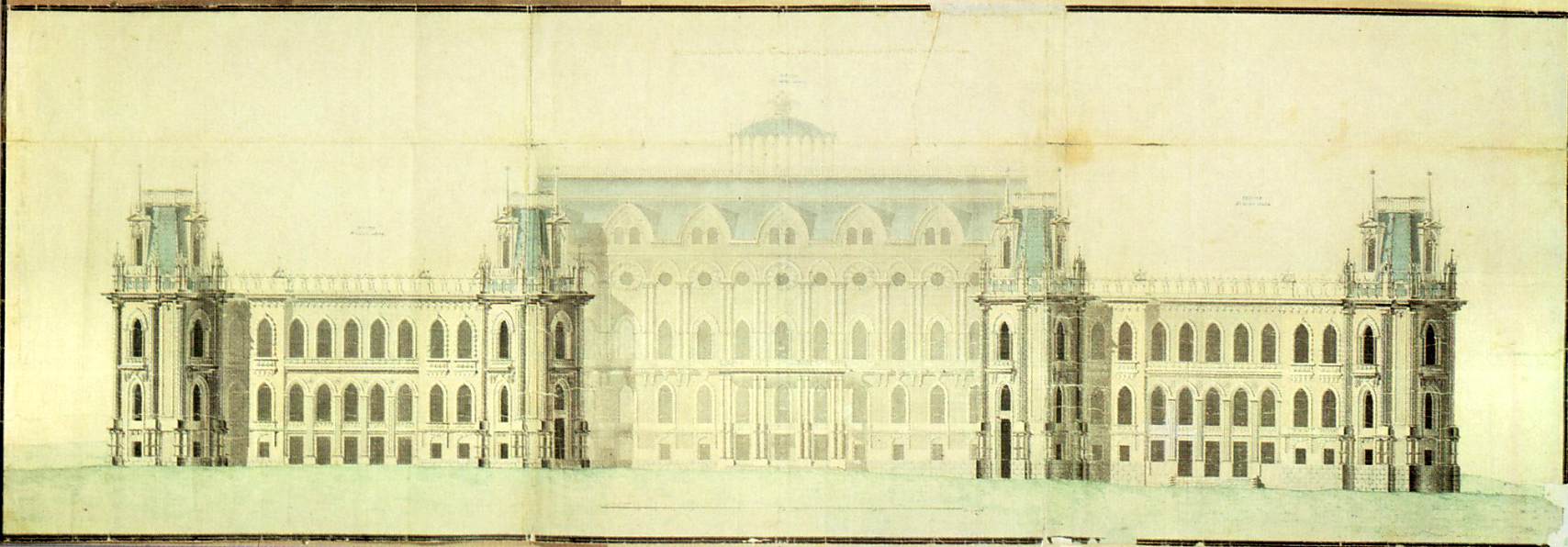 Первоначальный проект Большого Царицынского дворца